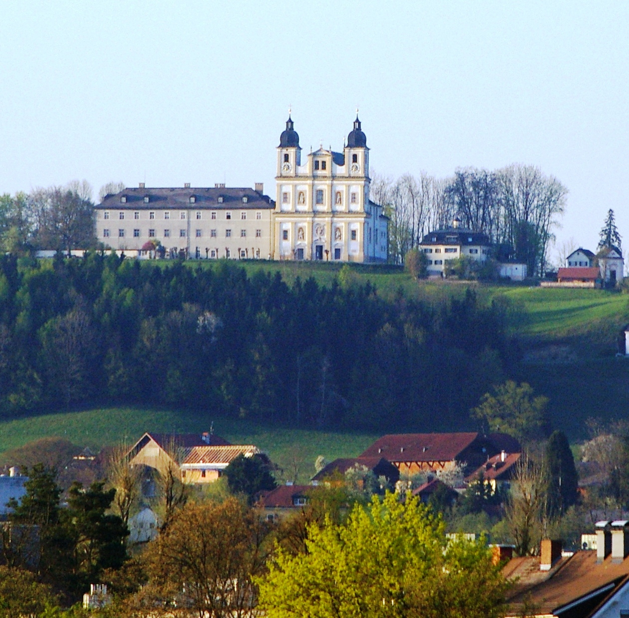 Wallfahrtskirche Maria Plain Salzburg